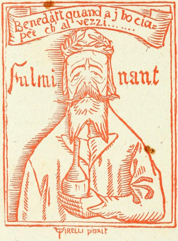 Illustration de La Secchia.